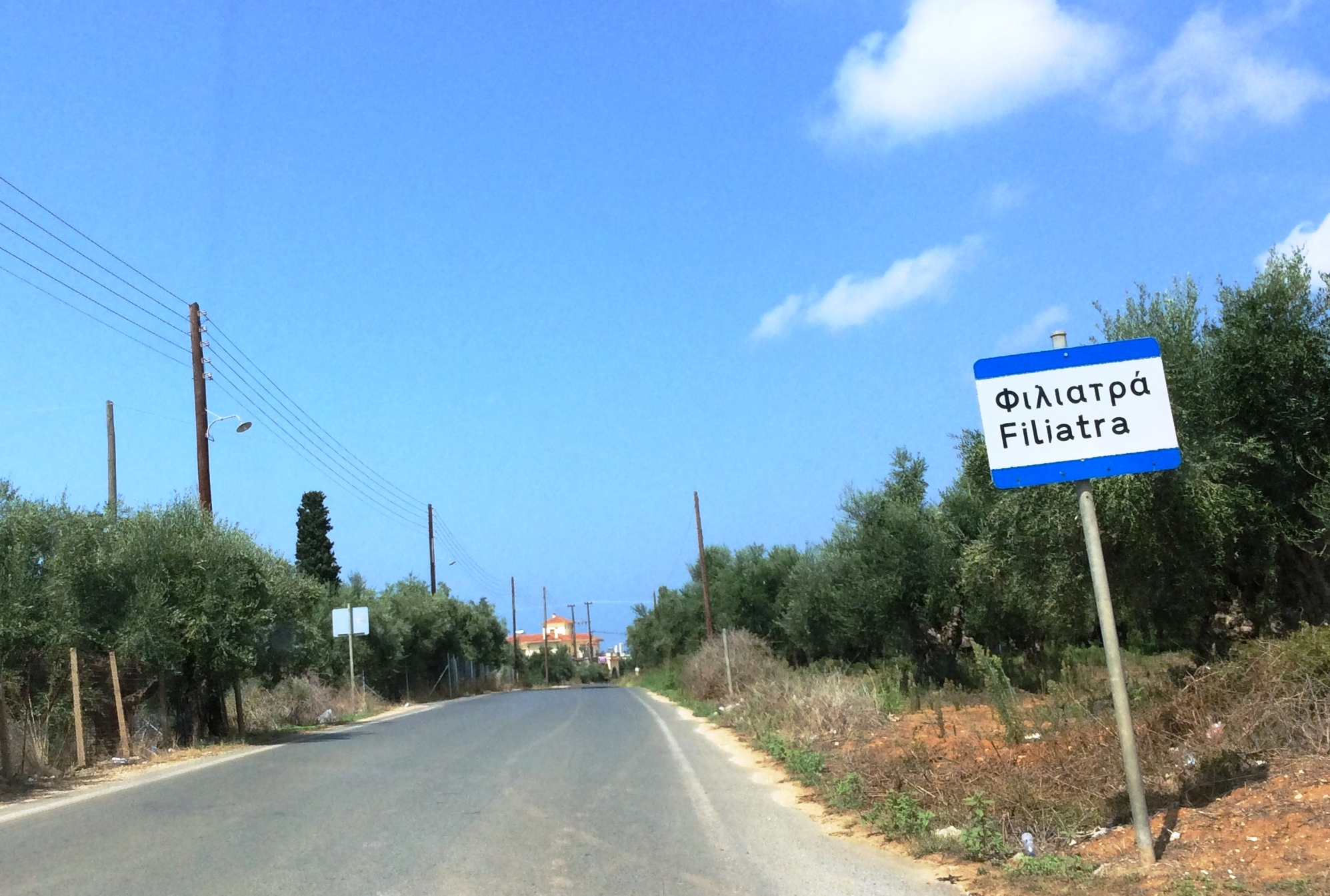 Φιλιατρά Μεσσηνίας. Νότια είσοδος στα Φιλιατρά από την οδό Φιλιατρών - Γαργαλιάνων.